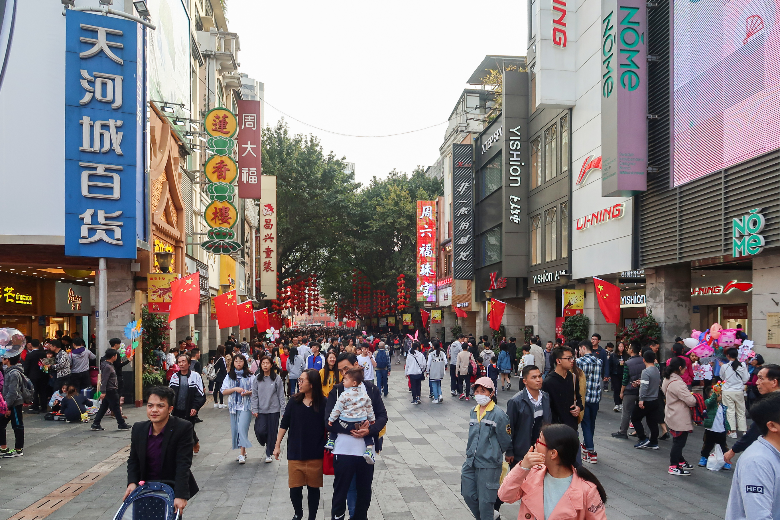 Beijing Lu Pedestrian Area